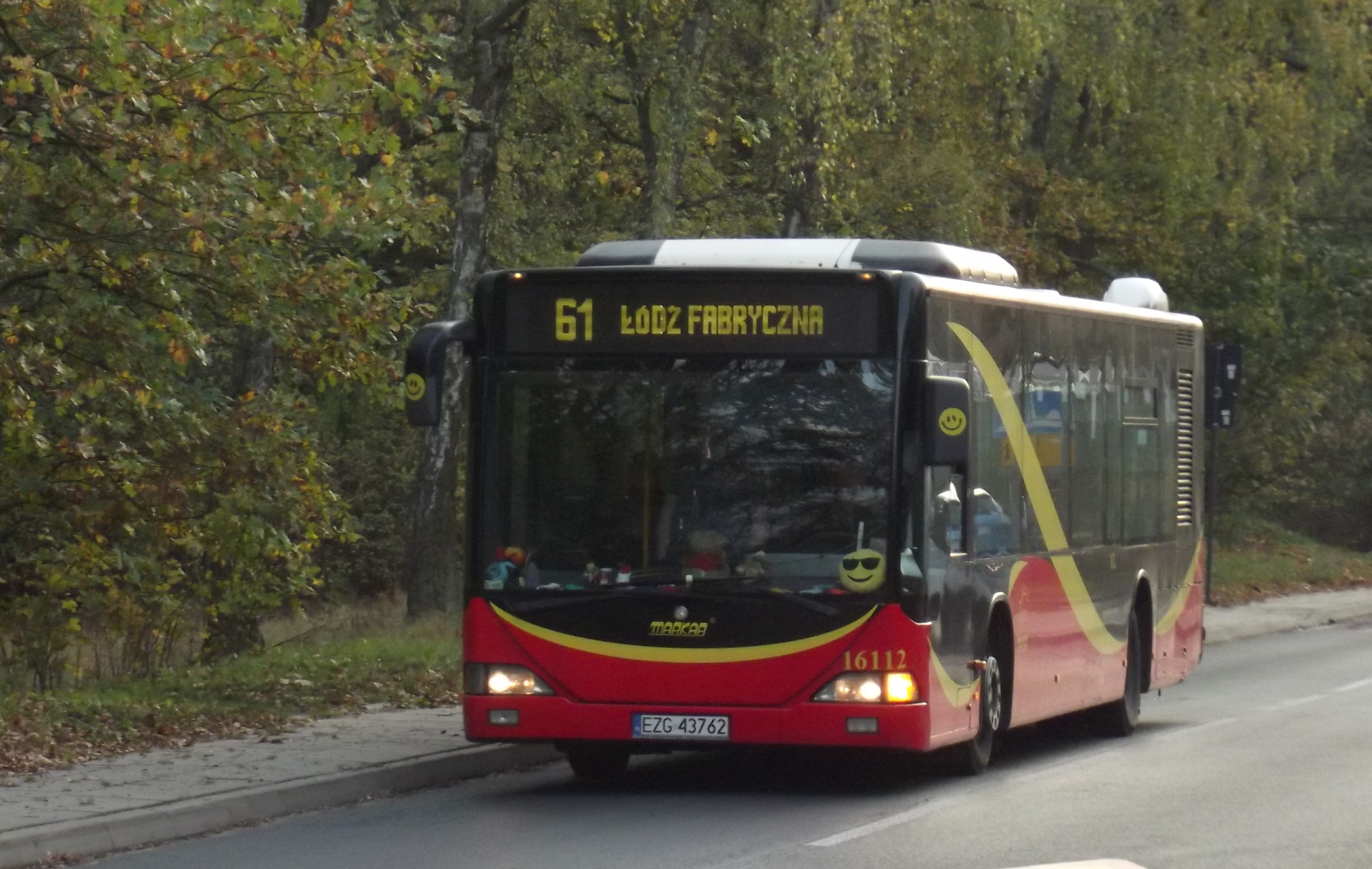 Zgierski Merol jako linia 61 zbliza sie do przystanku Łagiewniki w Łodzi